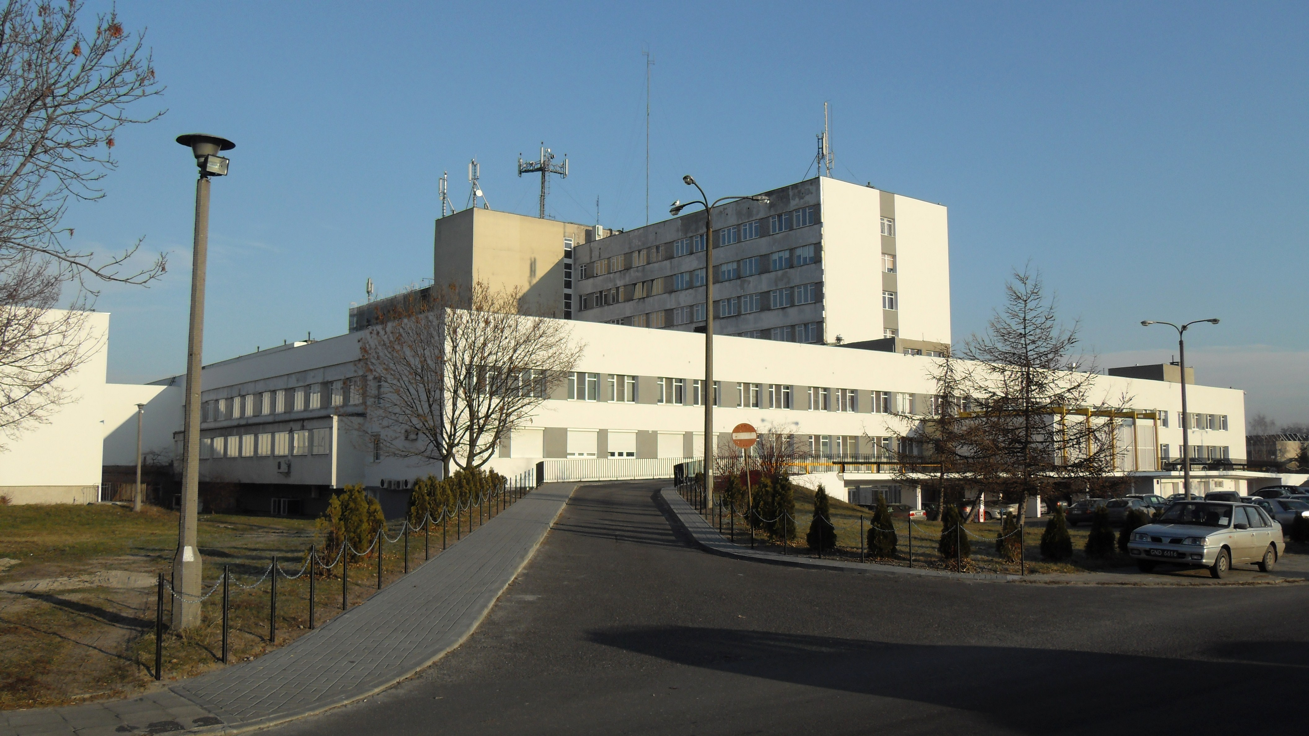 Gdańsk Zaspa. Szpital Specjalistyczny św. Wojciecha, al. Jana Pawła II 50.